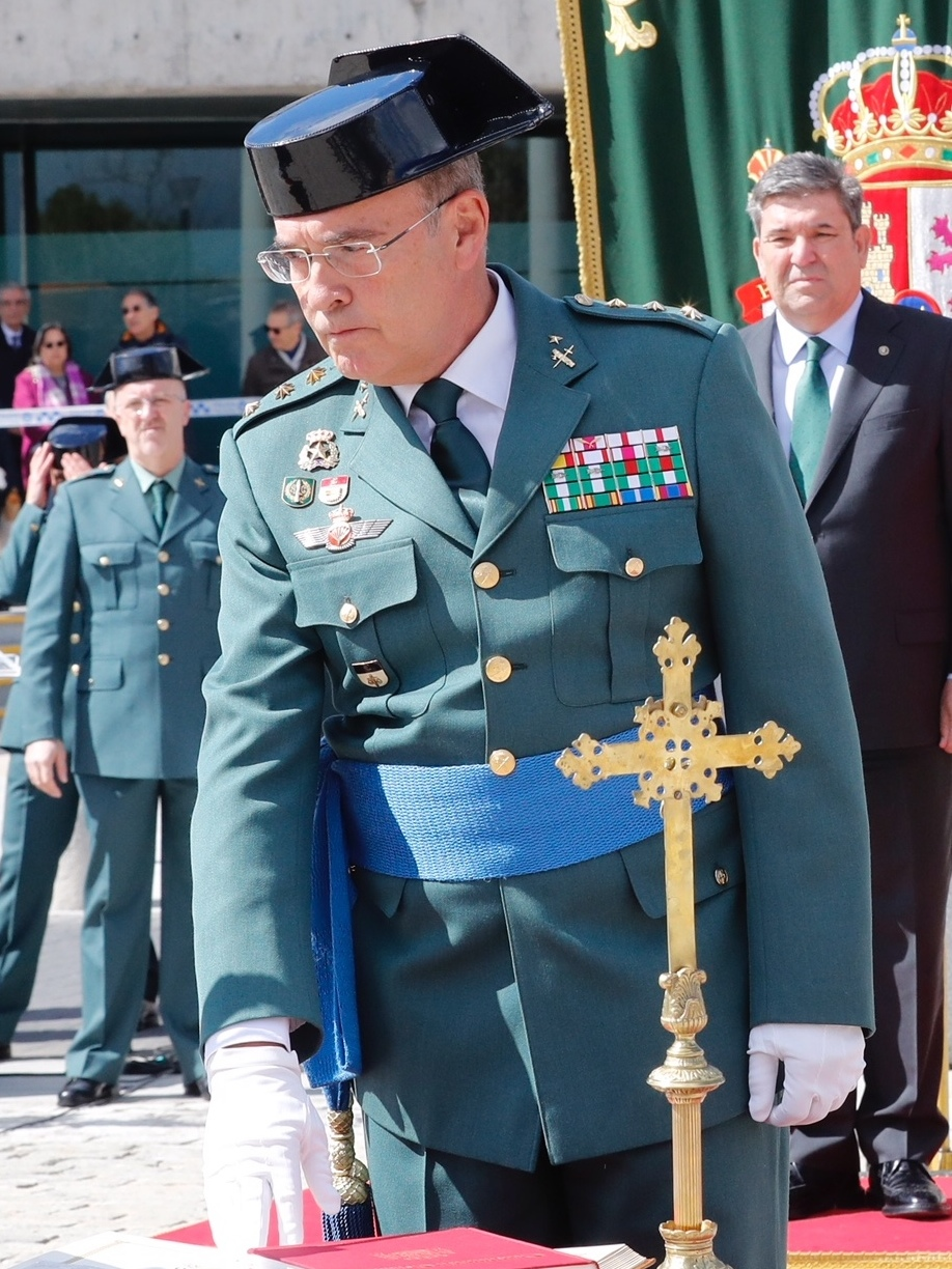 En la toma de posesión de Diego Pérez de los Cobos como Coronel Jefe de la Comandancia de la Guardia Civil en Madrid. Enhorabuena.